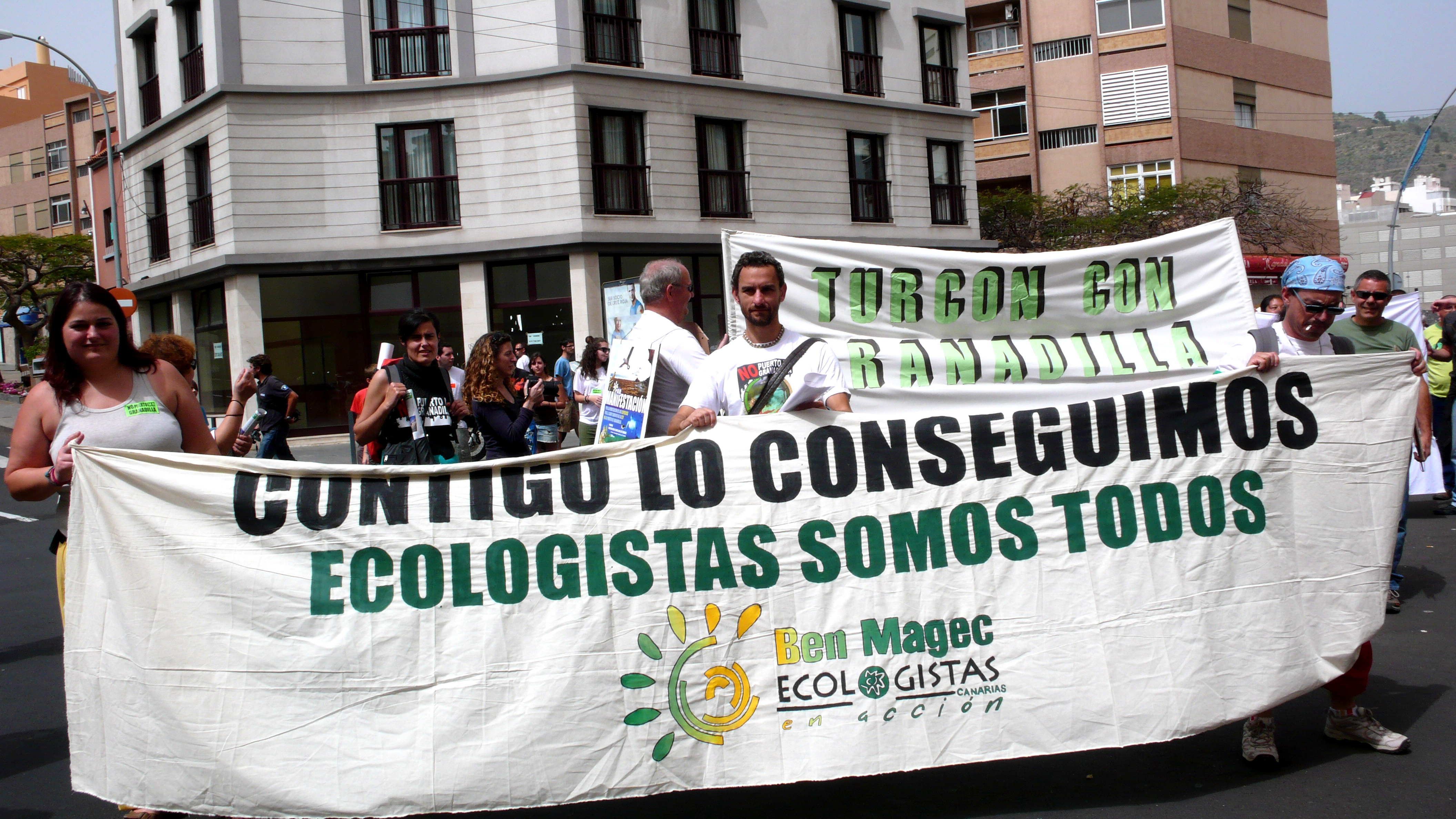 Demonstration of Ben Magec - Ecologistas en Acción